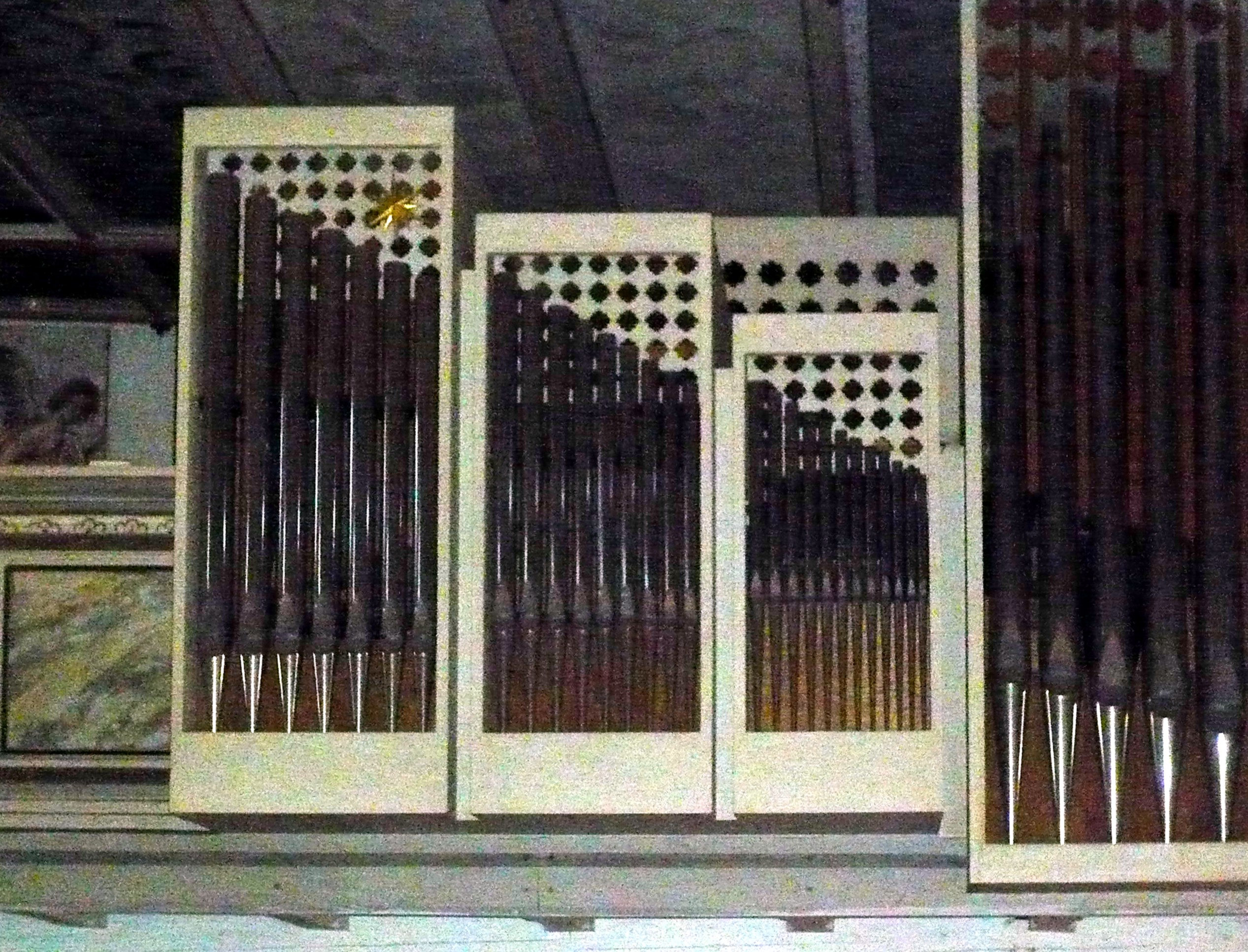 Dorfkirche Schellerhau, Orgel auf Empore